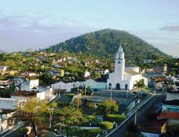 Imagem de Coaraci